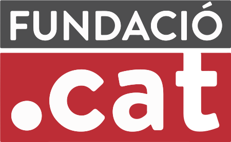 Logo do domínio .cat